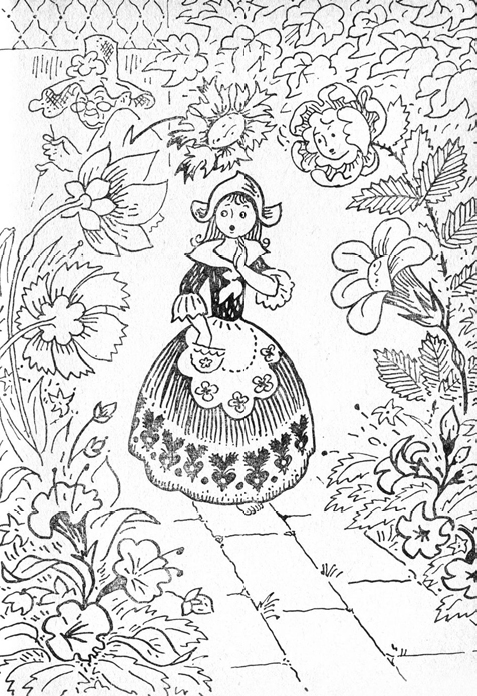 Иллюстрация к сказке Андресена "Снежная королева". Художник Д. А. Брюханов